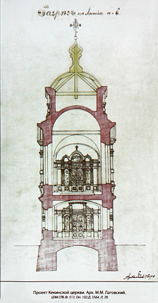 Проект храма на Митрофаниевском кладбище С-Петербурга